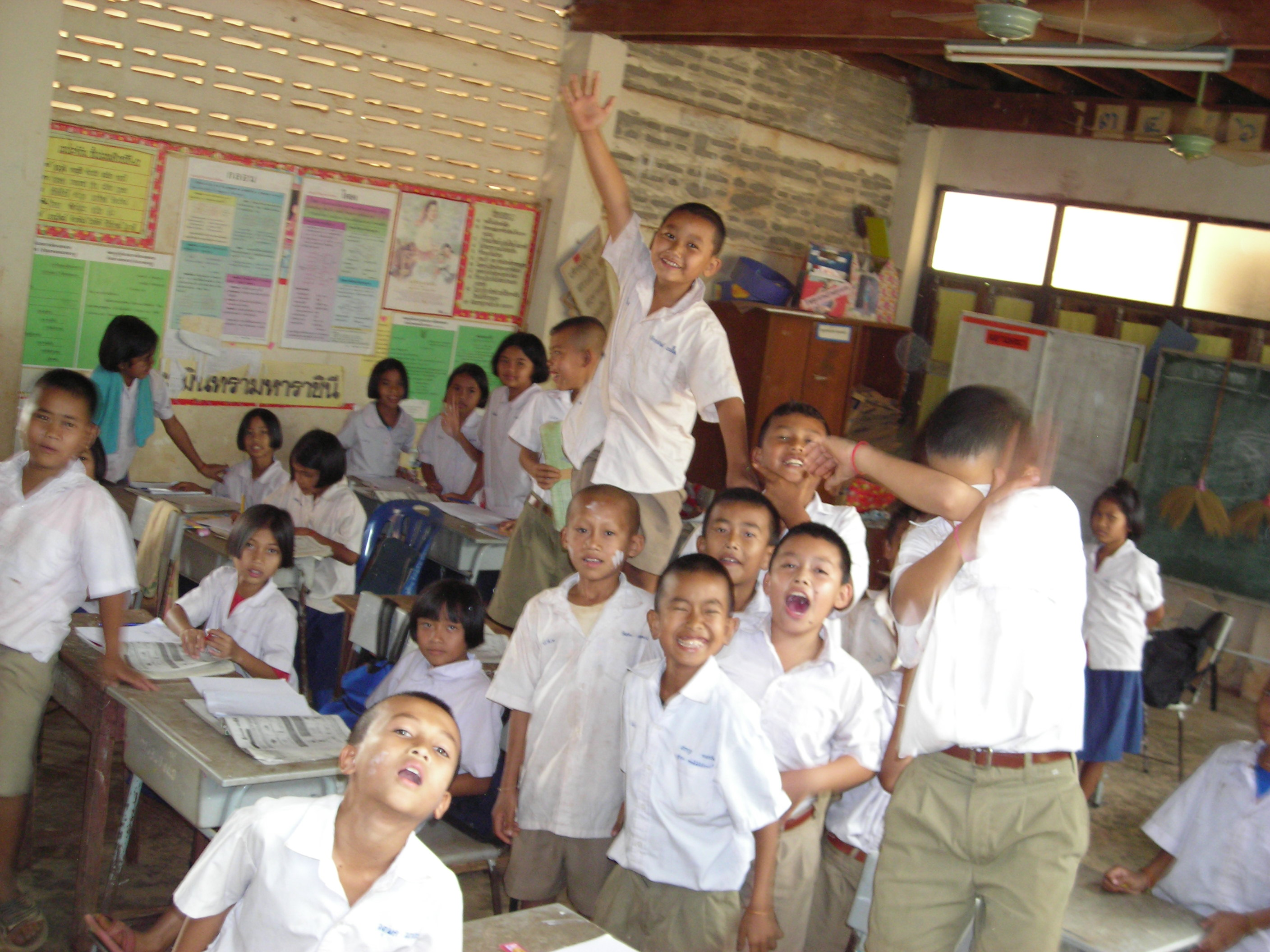 Klassenzimmer einer thailändischen Grundschule (Na Wa, Provinz Nakhon Phanom, Thailand